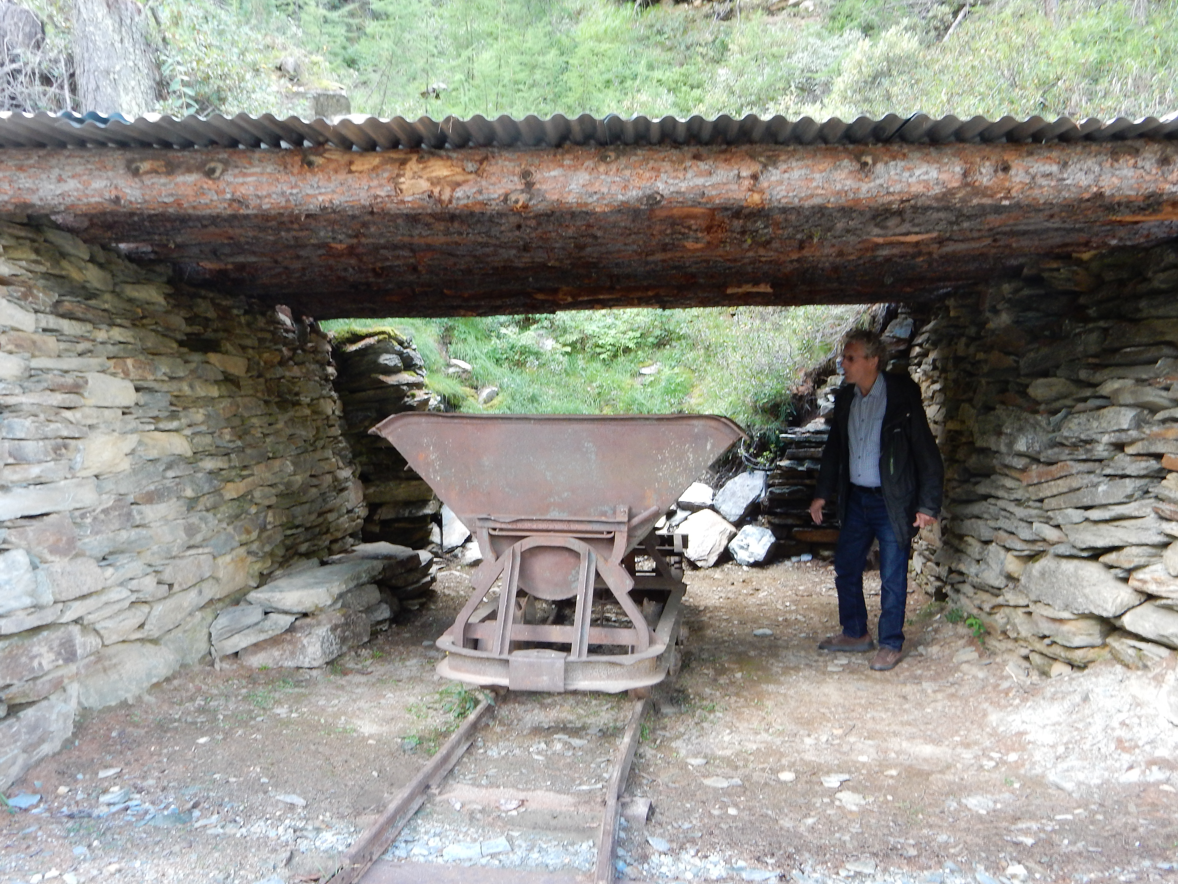 Cheva Plattas da Fex / Steinbruch der Fexerplatten: ein ehemaliger Stolleneingang, der eingestürzt ist. In der Mitte: historischer Schienentransportwagen (Kipplore).